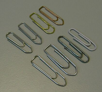 description: Büroklammern, source: eignes Bild mittels Digitalkamera, author: Benutzer:Alexander.stohr, permission: GNU-FDL